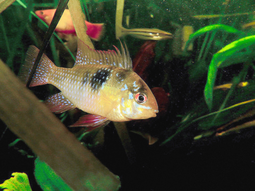 Hembra de Mikrogeophagus ramirezi